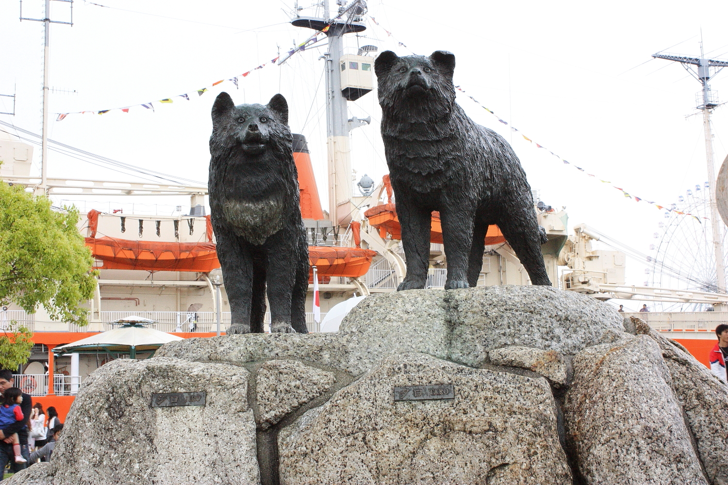 ガーデンふ頭にあるタロとジロの像（名古屋市港区港町、2009年（平成21年）5月）